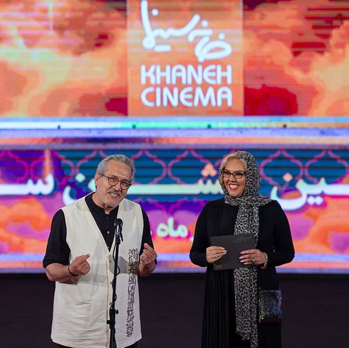 افسانه چهره‌آزاد و شاهرخ فروتنیان در بیست و یکمین جشن سینمای ایران - شهریور ۱۳۹۸